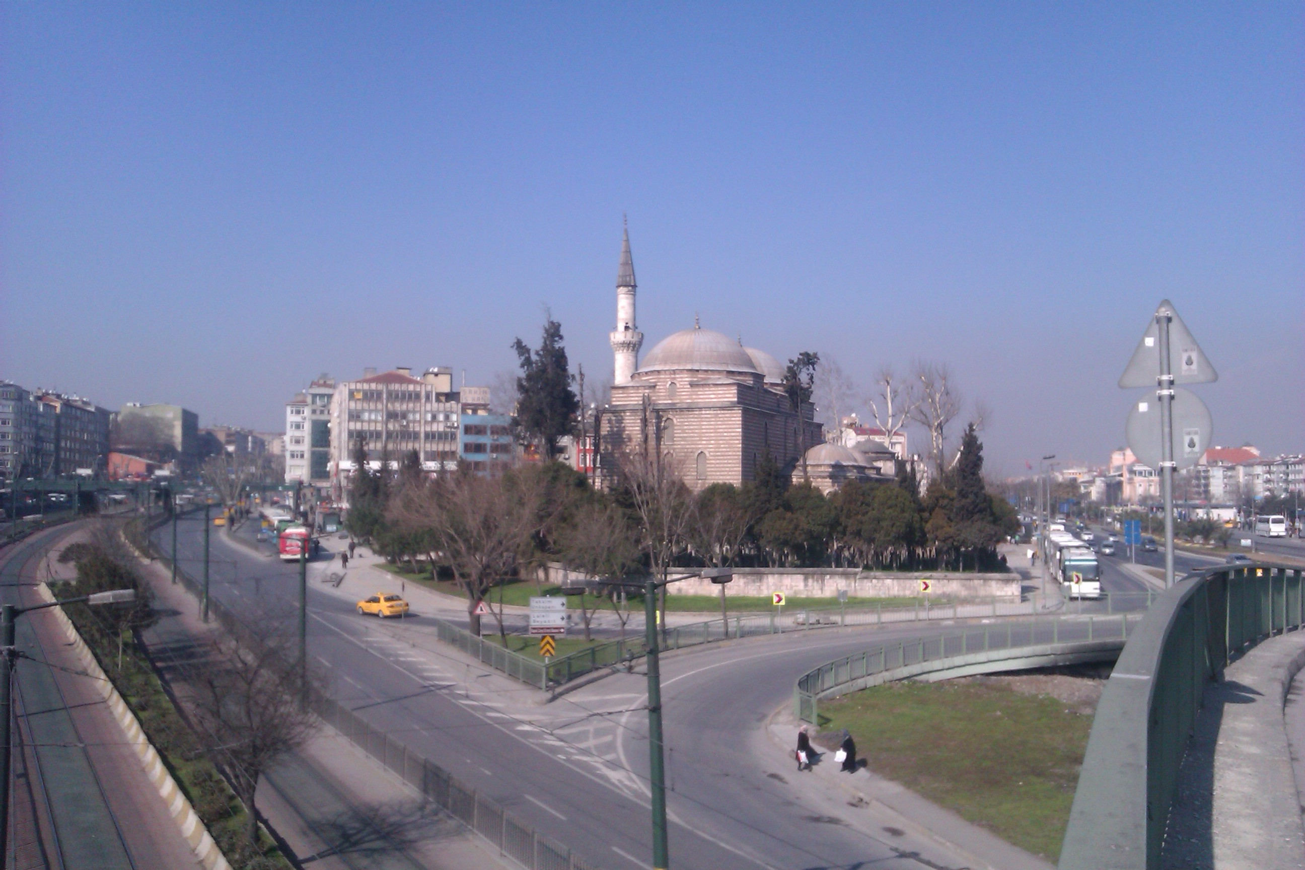 Murat Paşa Mosque